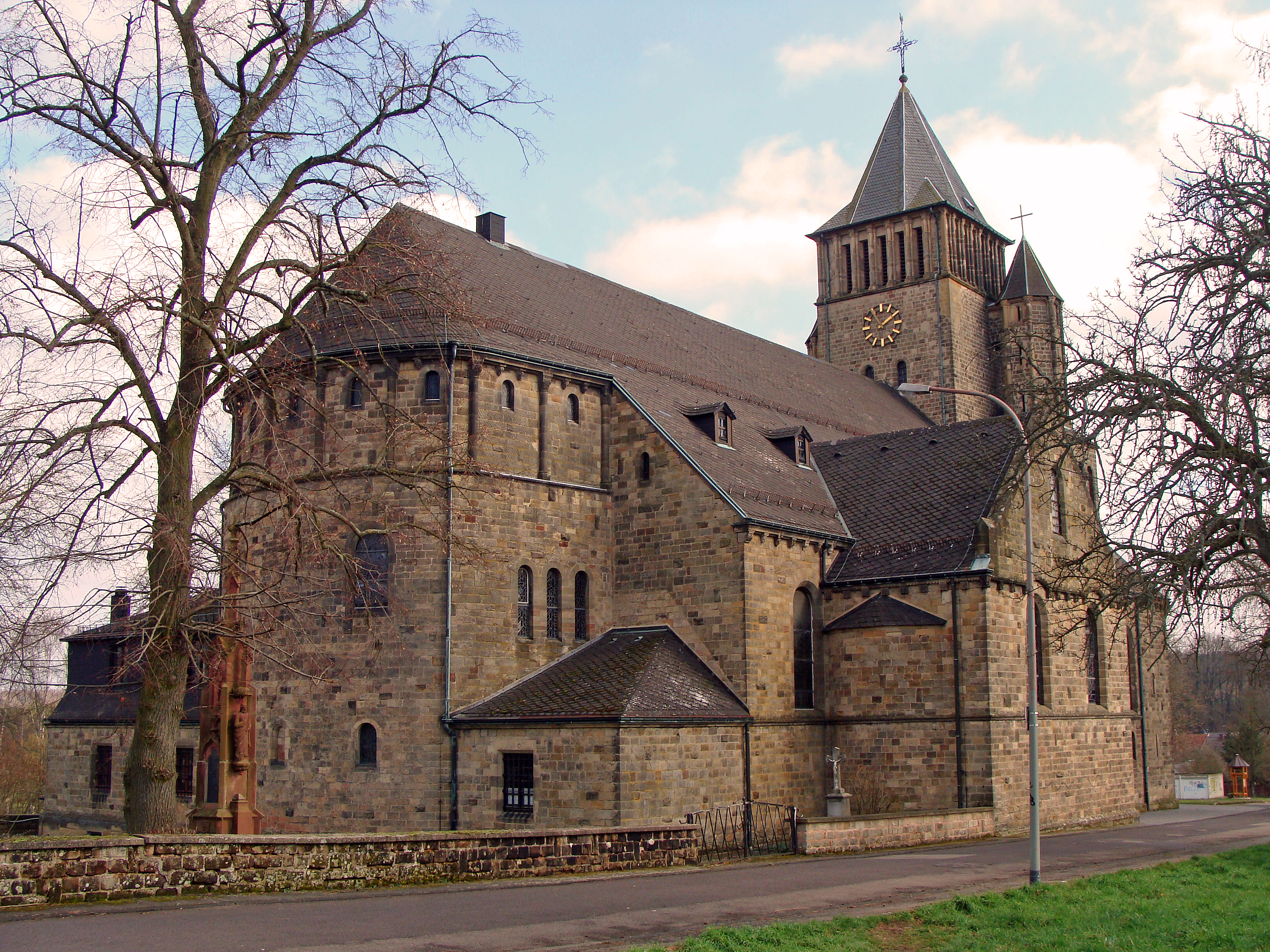 L'église Sankt-Paulinus de Lauterbach (Völklingen) construite en 1911. Elle est appelée "Warndtdom". Photo prise en mars 2014.